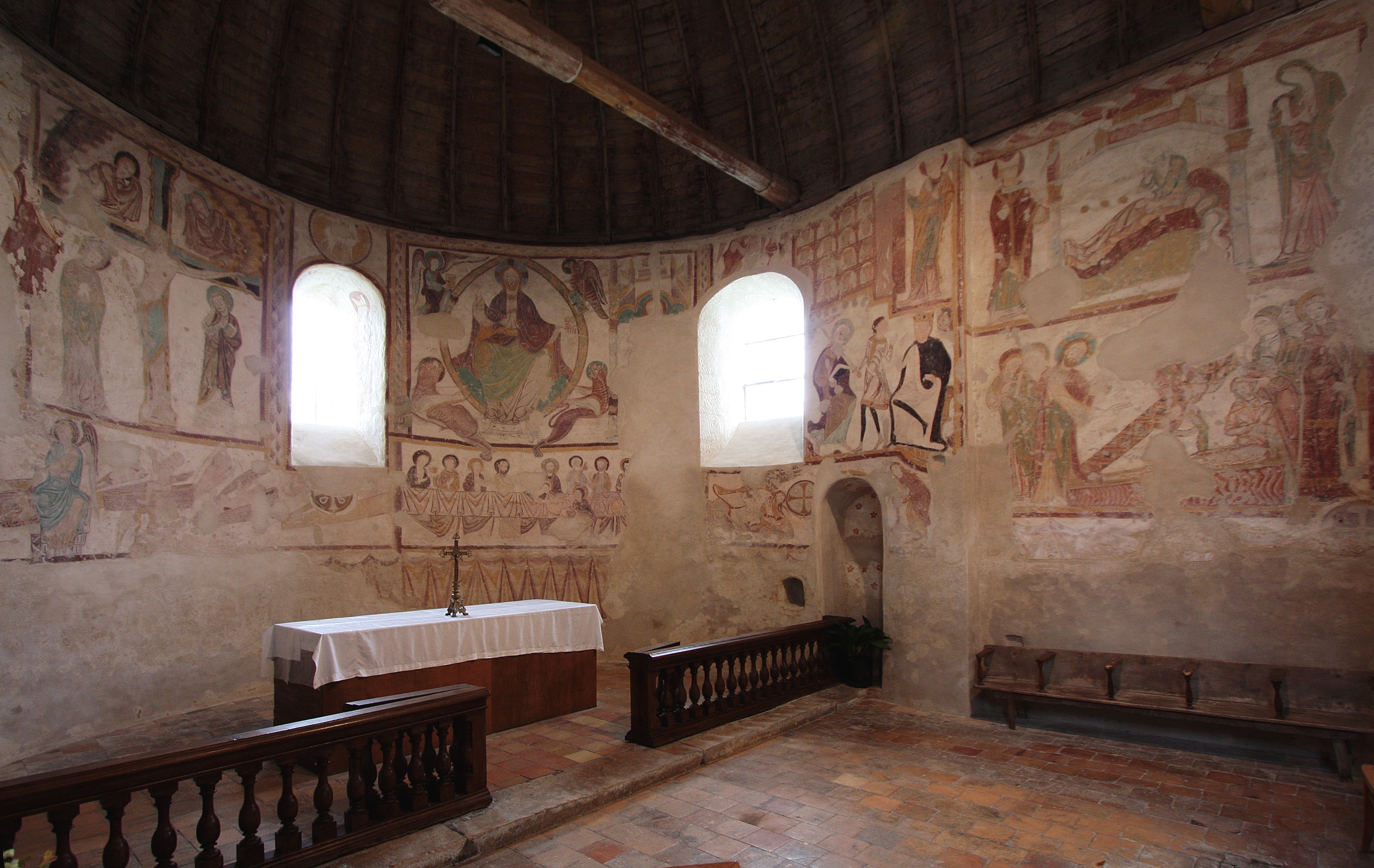 St-Jacques-des-Guérets (Loir-et-Cher, Frankreich) - Apsis